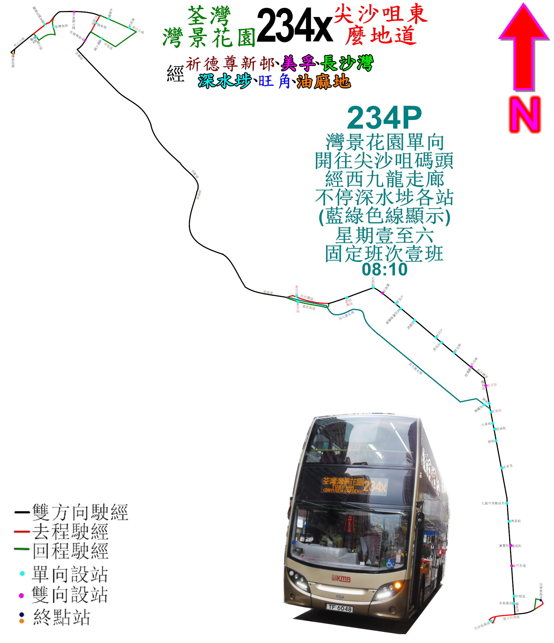 中文（香港）: 九巴234X線的走線圖